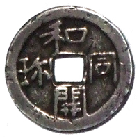 和同開珎銀銭の画像